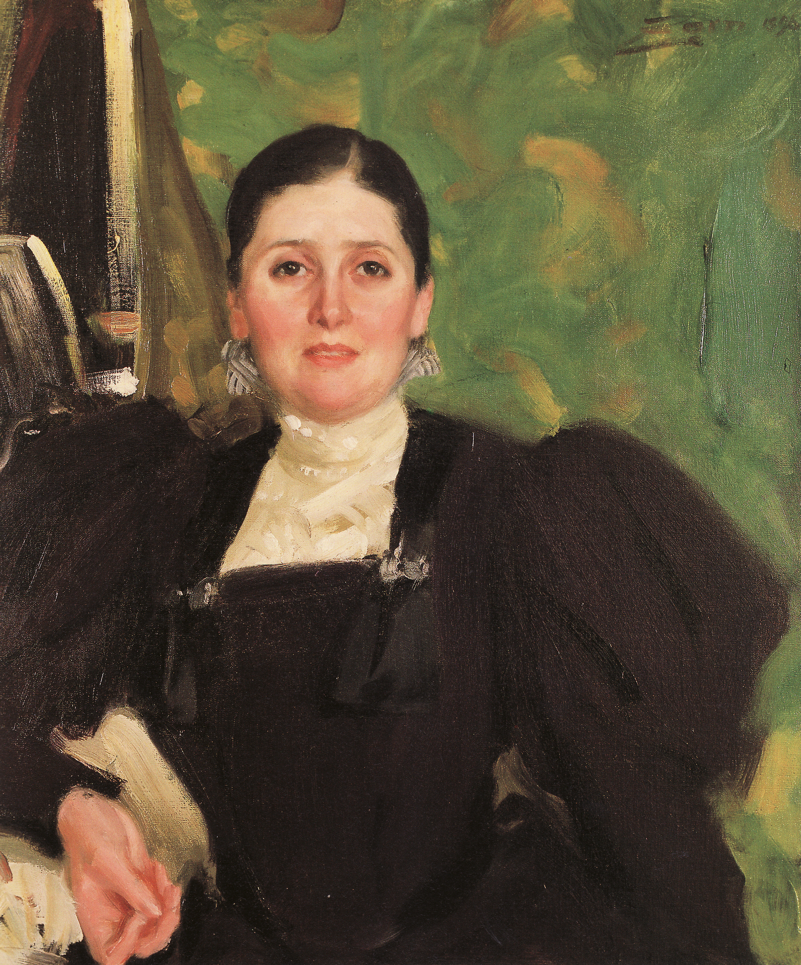 née